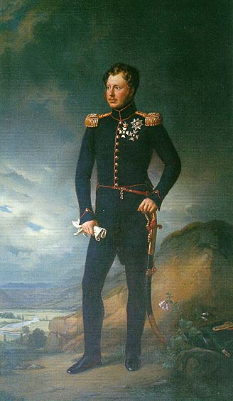 König Wilhelm I. von Württemberg (1781-1864)